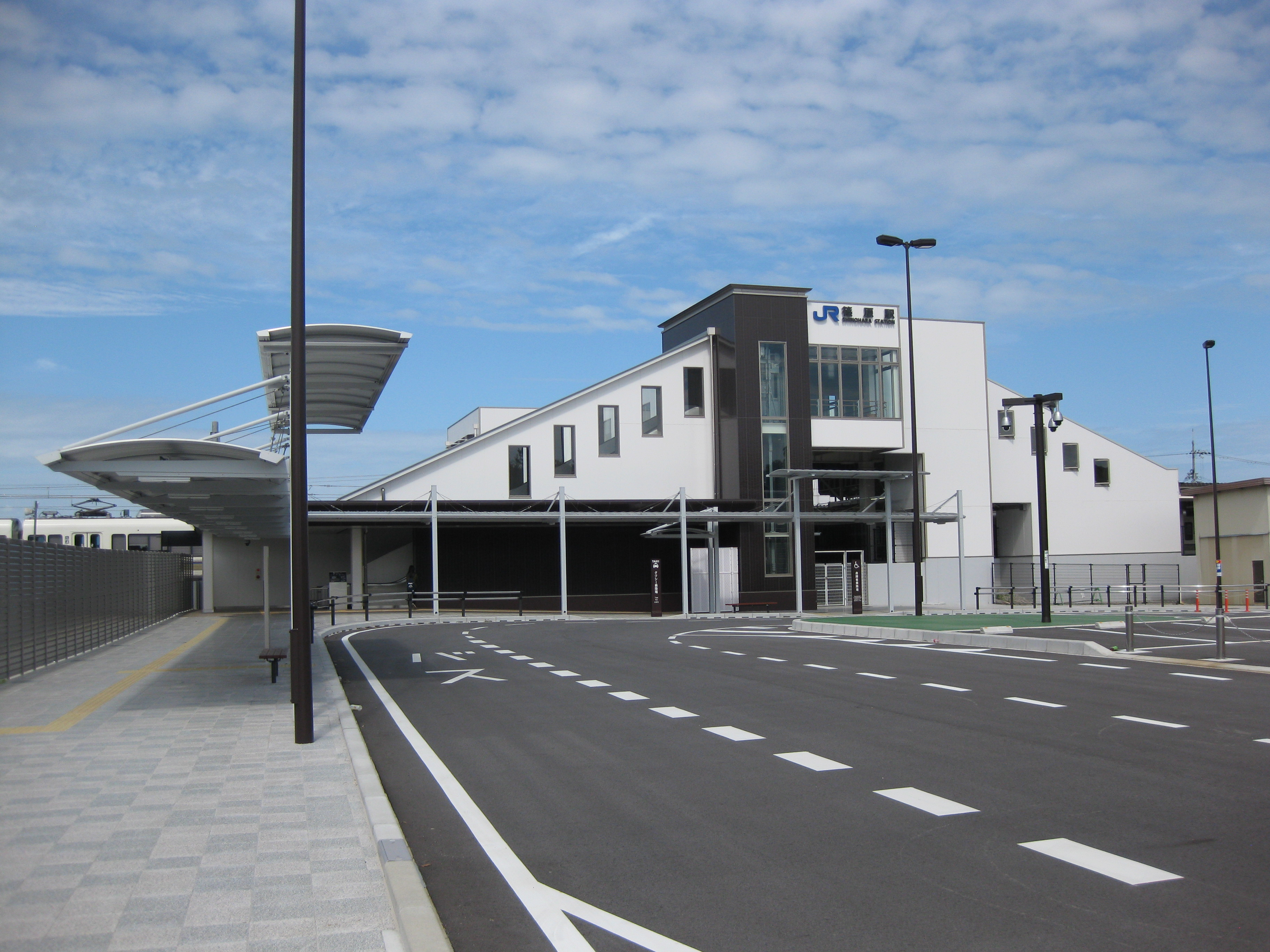 篠原駅南口